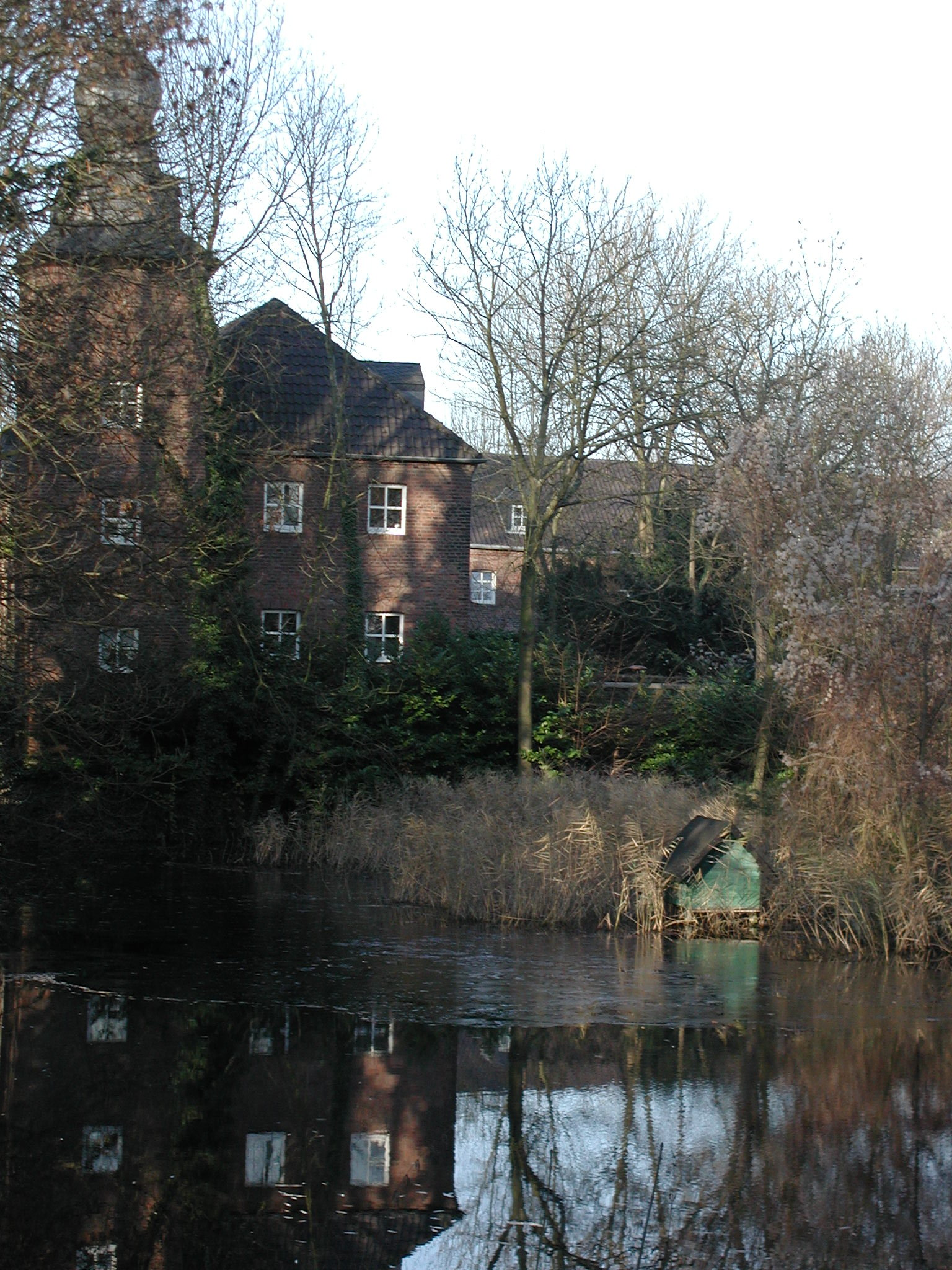 017-Burg-Kendenich-Detail